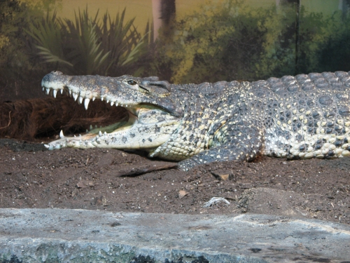 Cuban Crocodile